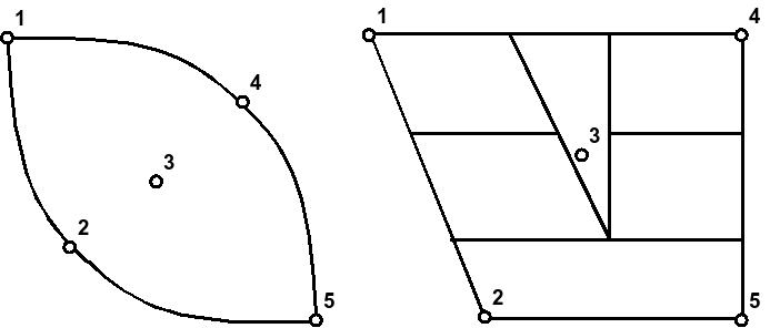 Артыкуляцыя галосных. Становішча вышэйшага пункта пад'ёму языка (паводле Дж. Д. О'Конара): 1 - пярэдняе высокае, 2 - пярэдняе нізкае, 3 - сярэдняе, 4 - задняе высокае, 5 - задняе нізкае. Злева — рэальная спрошчаная дыяграма руху, справа — просталінейная схема гэтай дыяграмы, якой часта карыстаюцца ў фанетыцы